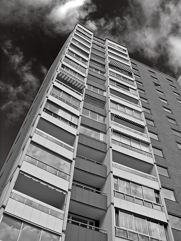 Storstugan, Täby, Stockholm, Sweden